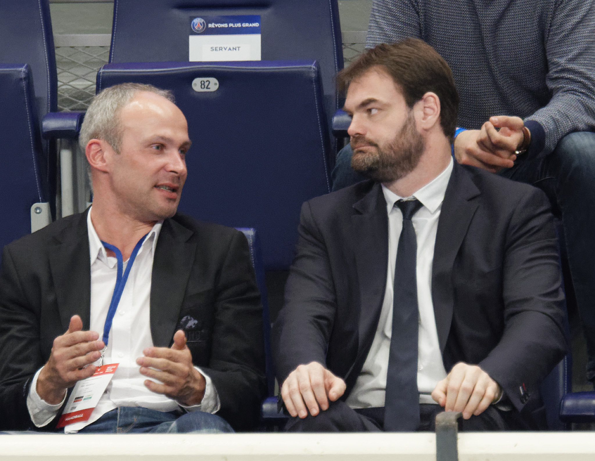 Christian Omeyer (à gauche), directeur général de Sélestat Alsace Handball aux côtés de Bruno Martini, manager du PSG Handball lors de la 20e journée de LNH entre le PSG Handball et Sélestat. A Coubertin, le 08 avril 2015.